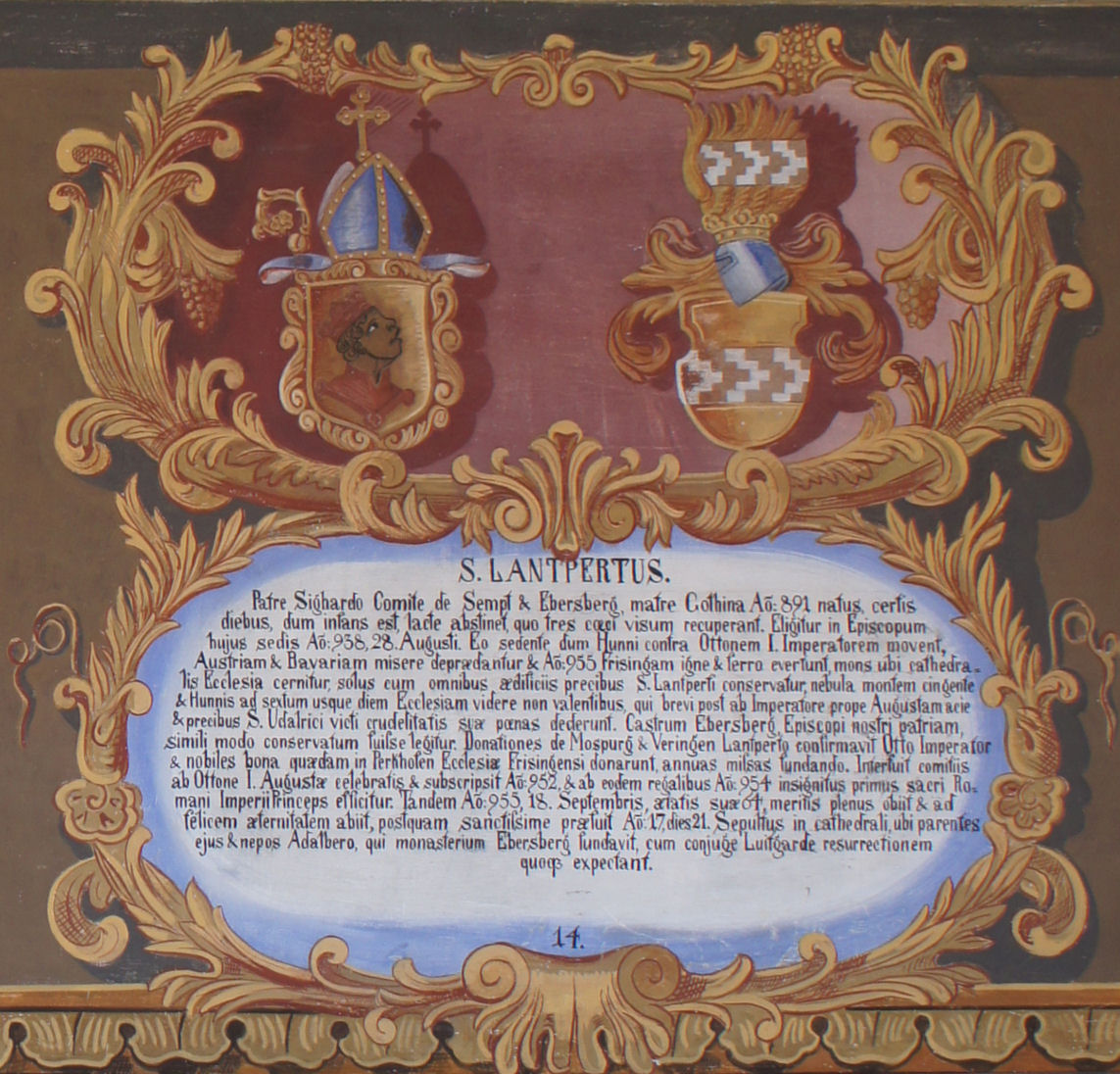 Wappentafel des Hl. Lantpert, Bischof von Freising, im Fürstengang zwischen Fürstbischöflicher Residenz und Freisinger Dom. Links das geistliche, rechts das persönliche Wappen, darunter ein lateinischer Text mit kurzer Biographie.